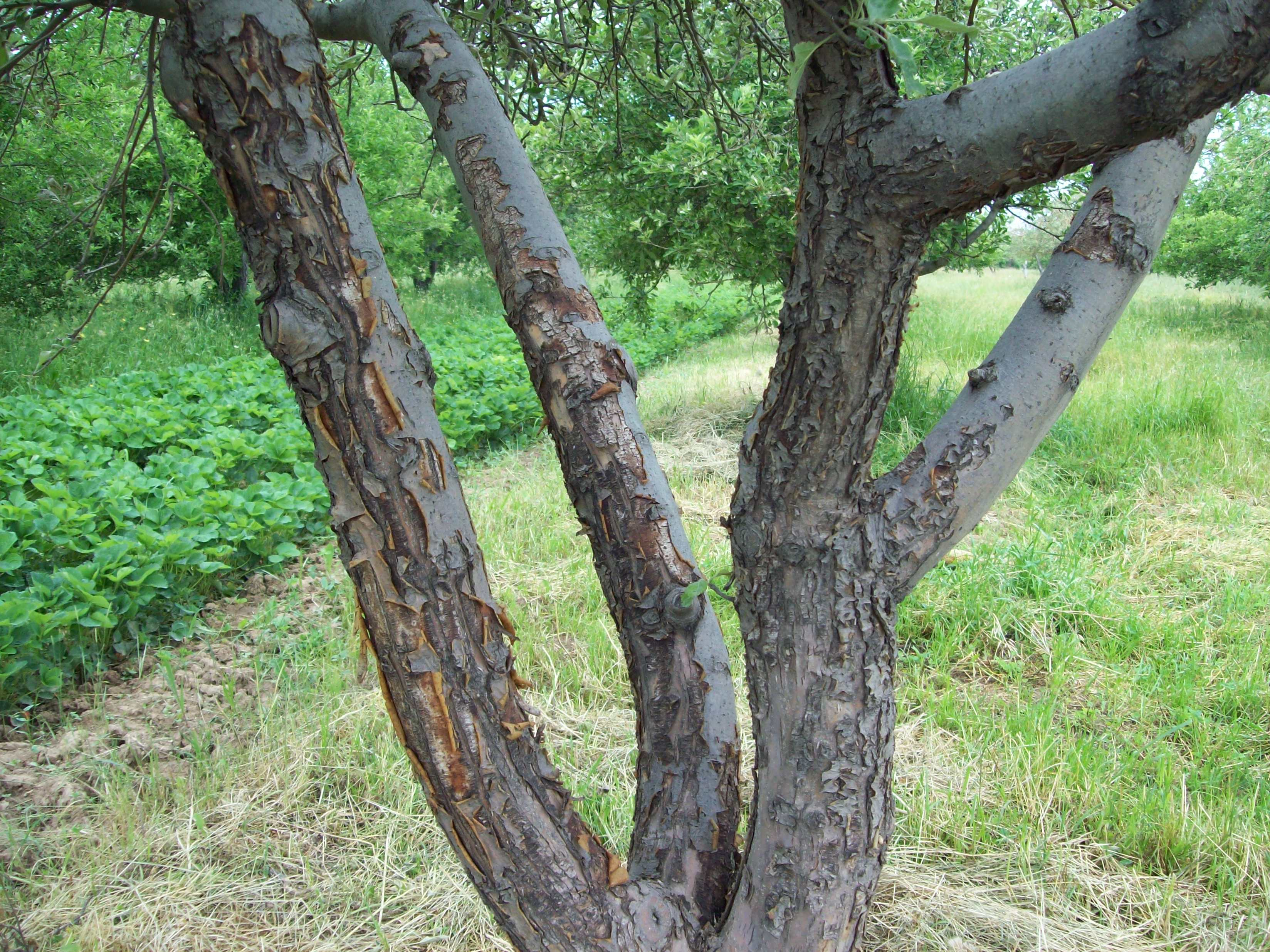 Цитоспориоз - болезнь усыхания яблони.